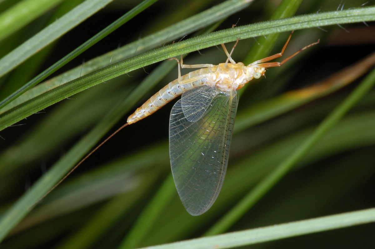 Eintagsfliege, Knüllwald, Hessen, Deutschland